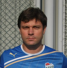 WeeklyBalkan did an Interview with the coach of Bursaspor, Ertuğrul Sağlam.